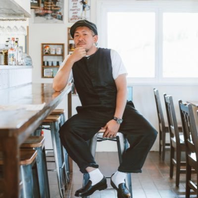 シンガーソングライター 江頭勇哉